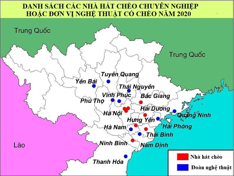 Sơ đồ danh sách các đoàn chèo, nhà hát chèo Việt Nam